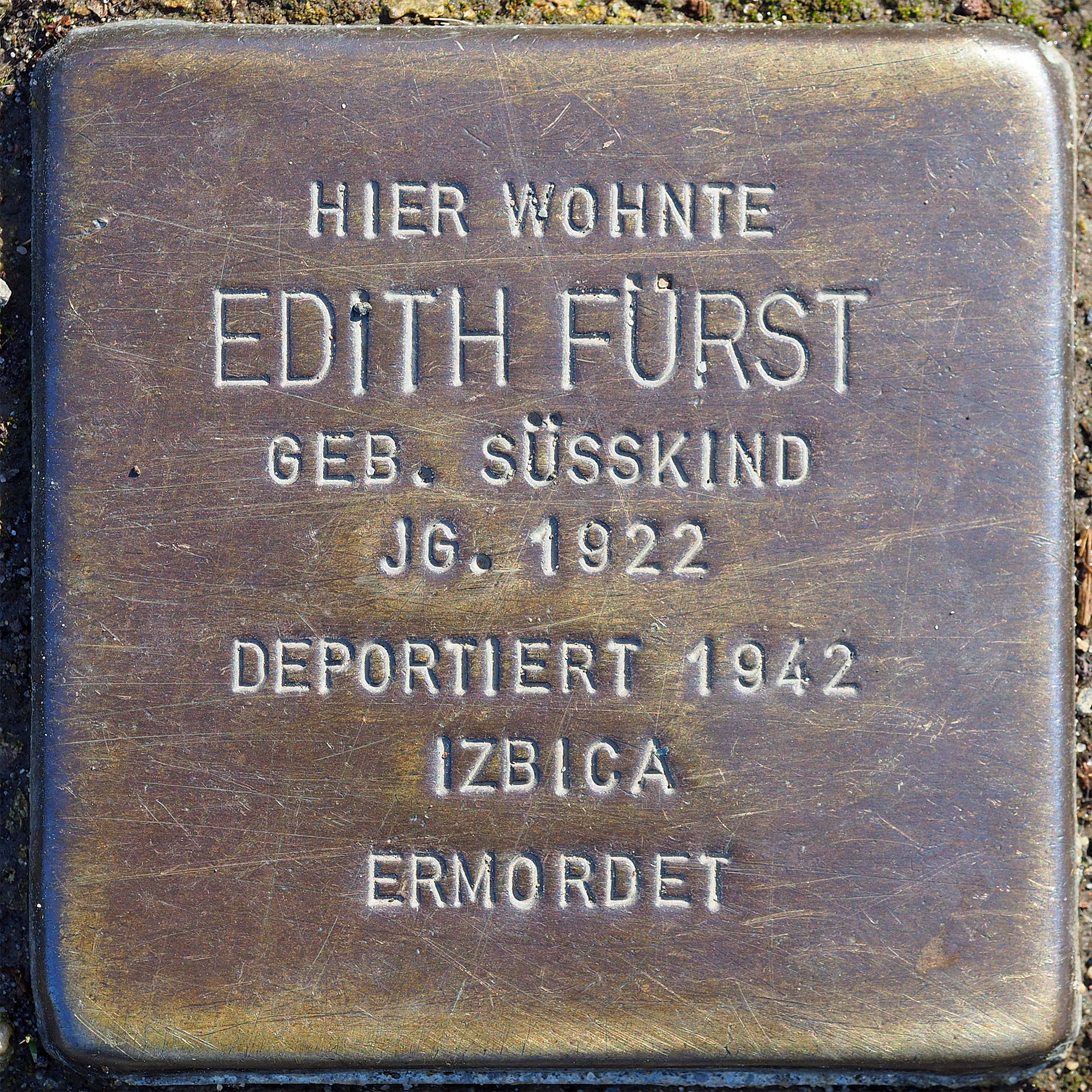 Stolpersteine MG: Fürst, Edith